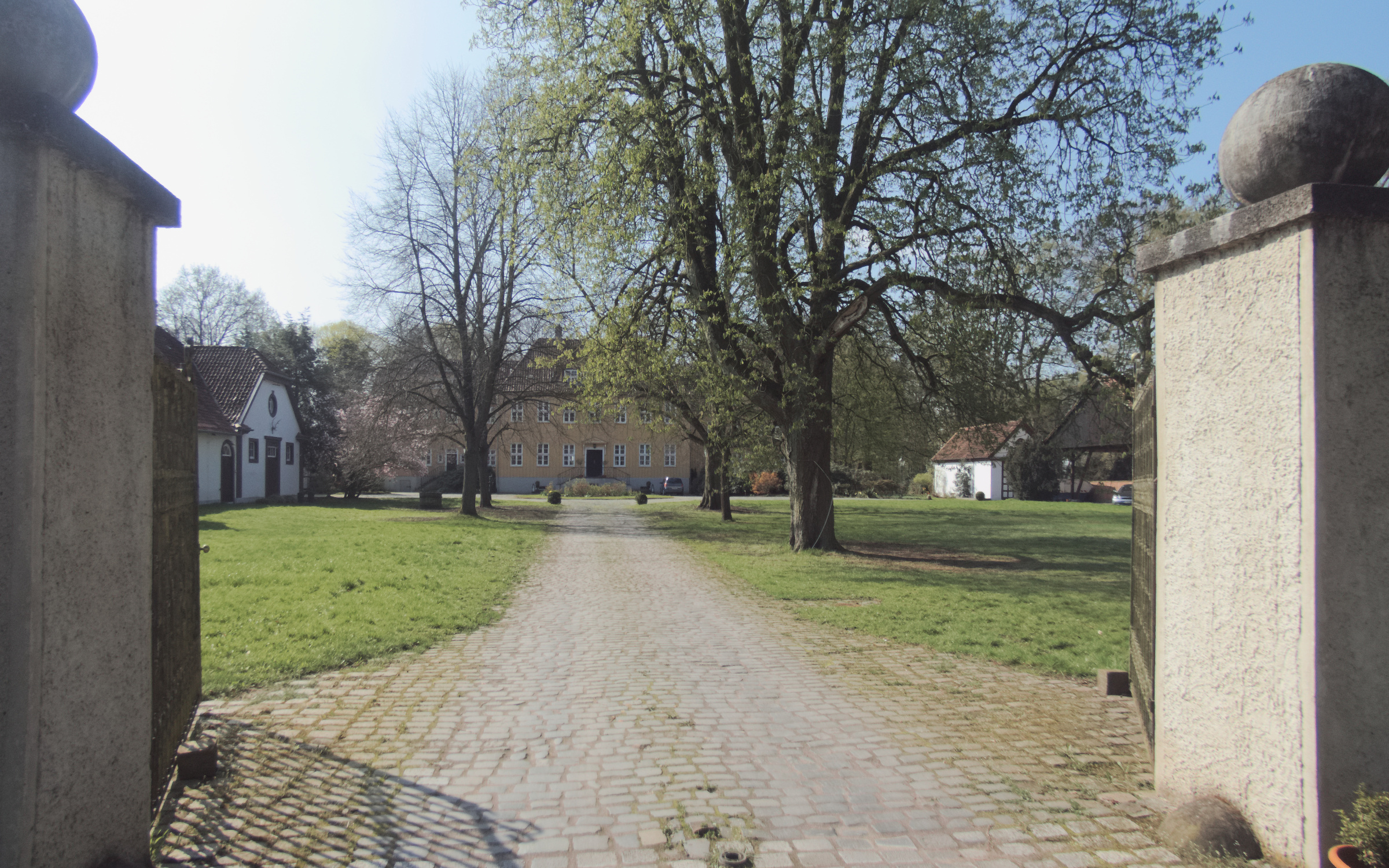 Blick durch das Tor zum Rittergut Heitlingen